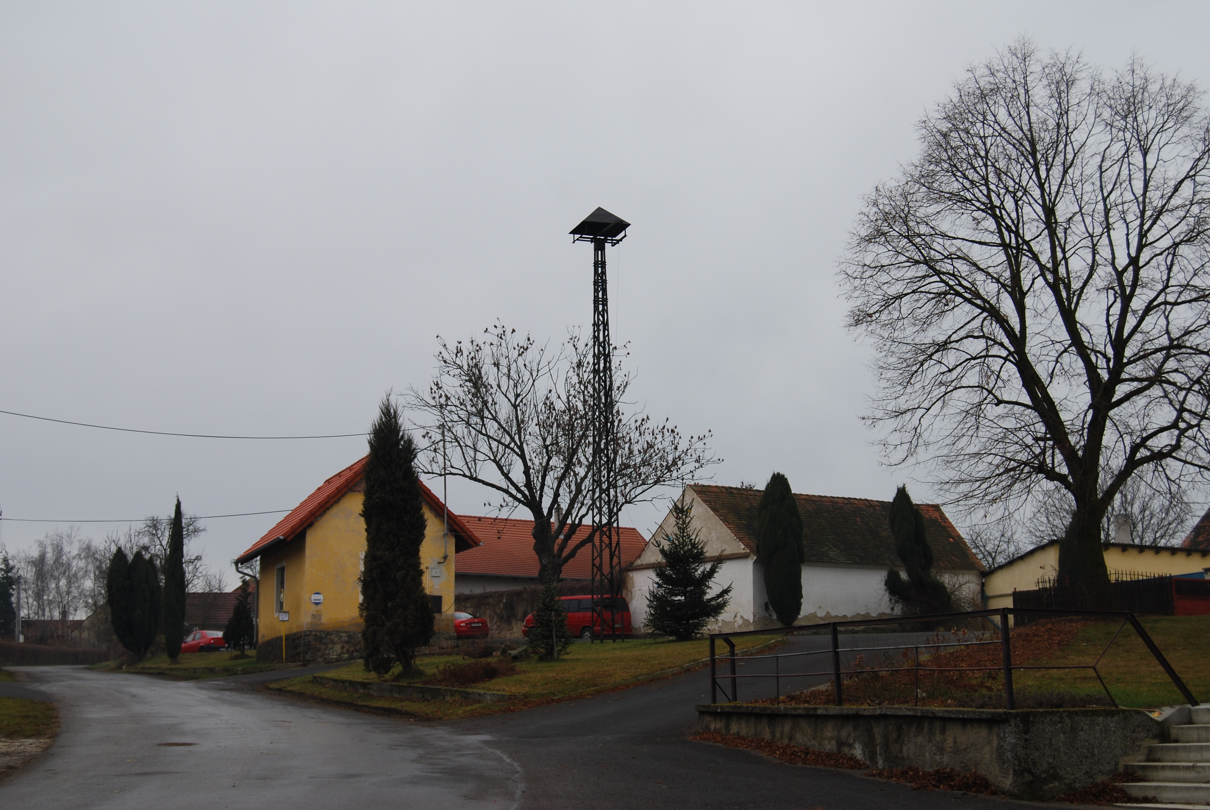 Kozlov je část obce Střelské Hoštice v okrese Strakonice.Česká republika.